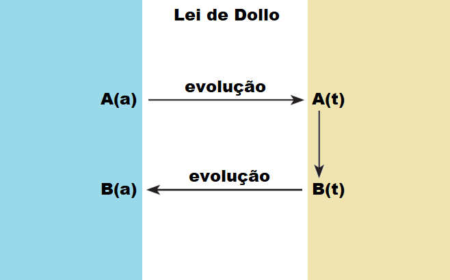 Modelo evolutivo que atende a Lei de Dolo